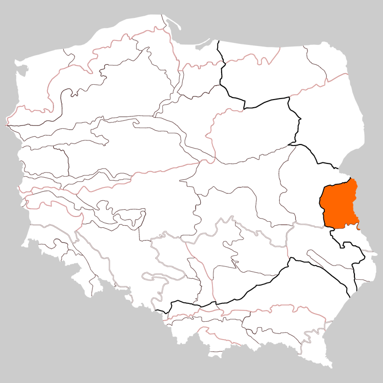 Physico-geographical regionalization of Poland Macroregion 845.1 Western Polesie Regionalizacja fizycznogeograficzna Polski Makroregion 845.1 Polesie Zachodnie